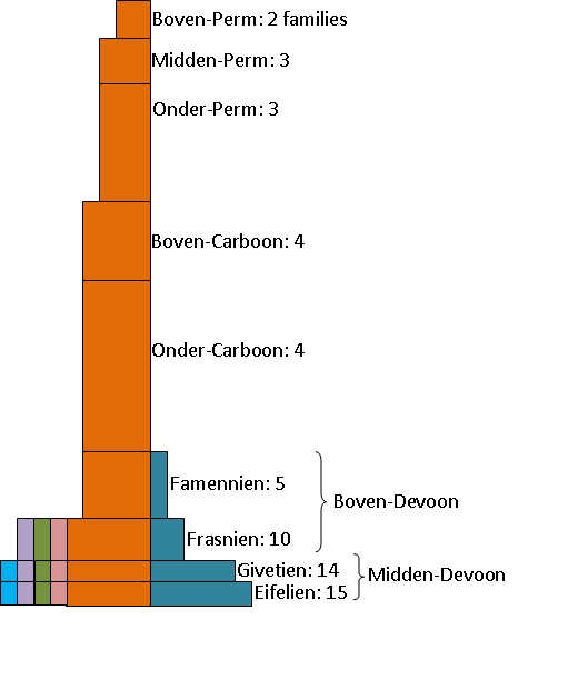 Trilobietendiversiteit uitgedrukt in aantal families per tijdvak en tijd tussen het begin van het Midden-Devoon en het eind van het Perm. De hoogte van de vakken correspondeert met de relatieve tijd(vak)lengte. De kleuren vertegenwoordigen trilobietenorde": bruin - Proetida; staalblauw - Phacopida; helderblauw Lichida; roze, olijfgroen en paars - Harpetida, Odontopleurida en Corynexochida. Bronnen: Feist, R. (1991). The Late Devonian Trilobite crisis. Historical Biology 5: 197-214, and Feist, R. (2002). Trilobites from the latest Frasnian Kellwasser Crisis in North Africa (Mrirt, central Moroccan Meseta). Acta Palaeontologica Polonica 47 (2): 203–210